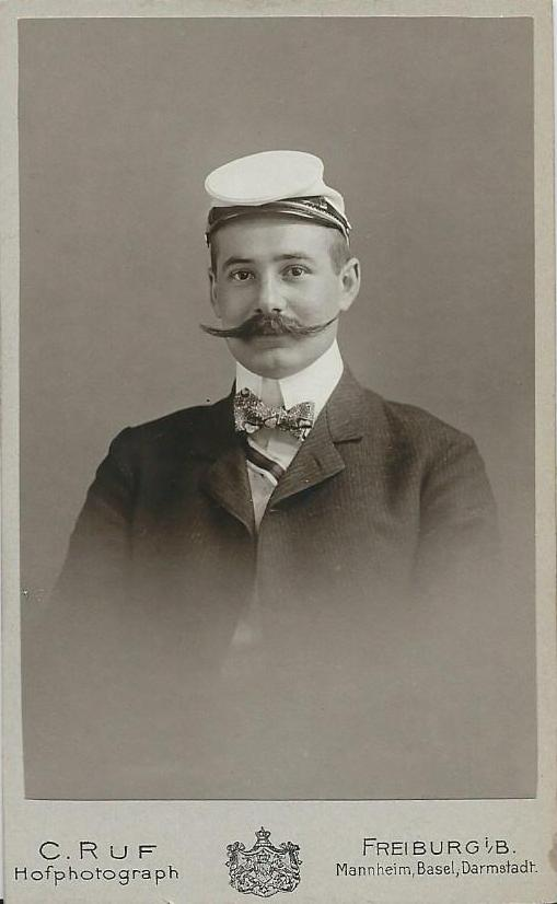 Paul Schäfer als Mitglied des Corps Hasso-Borussia Freiburg